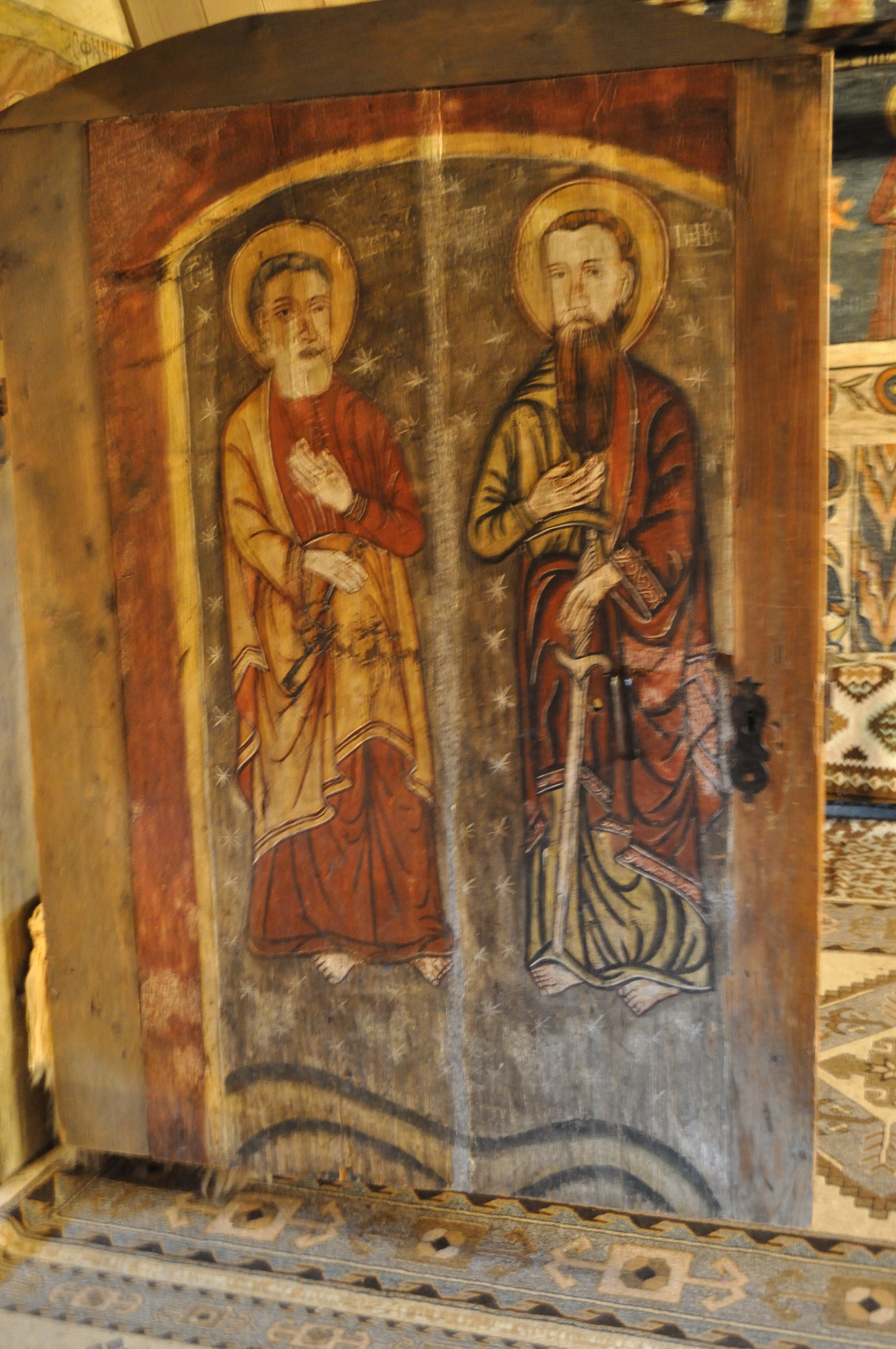 Biserica de lemn „Cuvioasa Paraschiva" din Desești, județul Maramureș